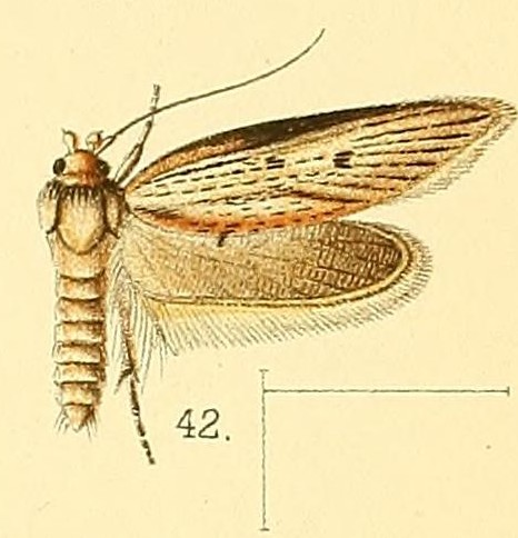 Procometis acutipennis